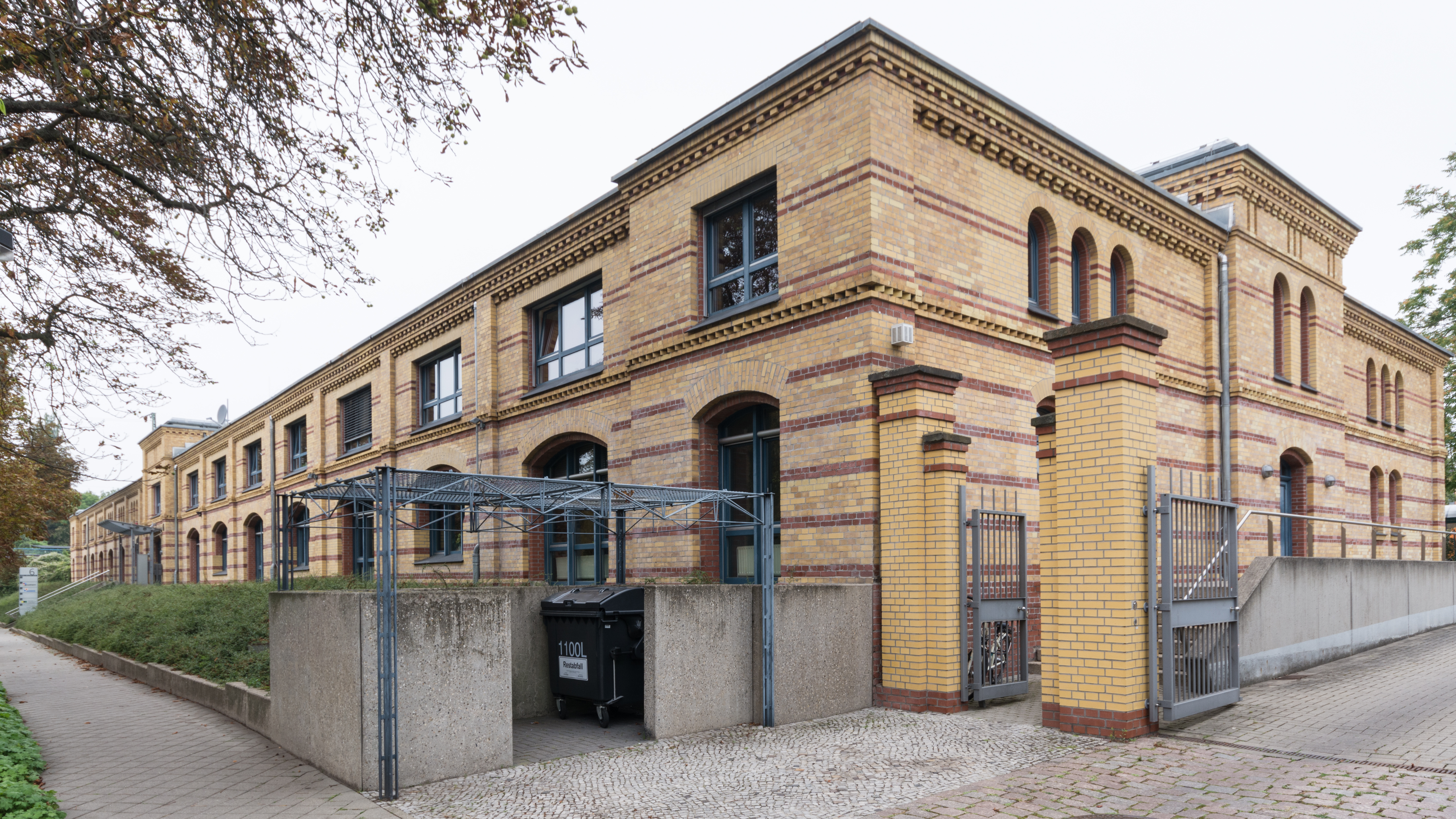 Kasernengebäude Carl-Miller-Straße 6 in Magdeburg-Altstadt. This is a photograph of an architectural monument.It is on the list of cultural monuments of Magdeburg